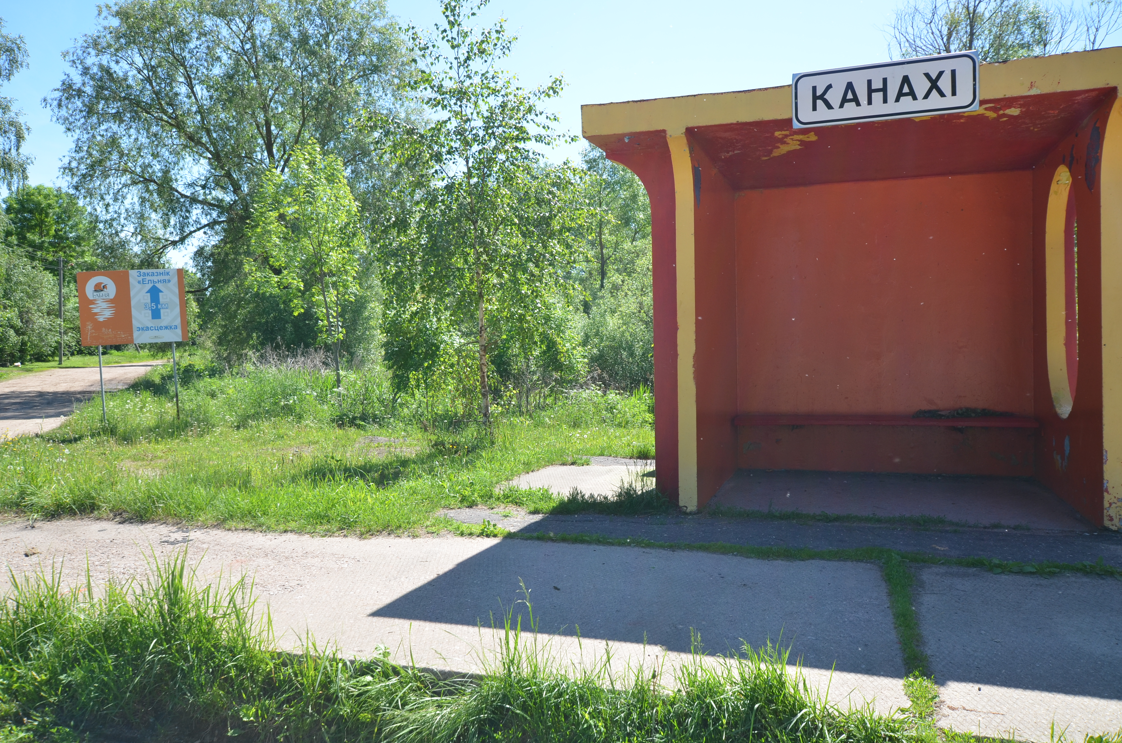 Уезд у вёску Канахі